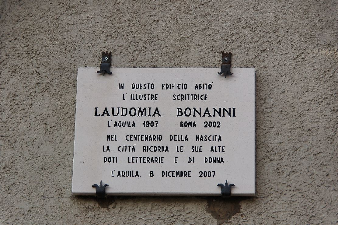 L'Aquila 2011